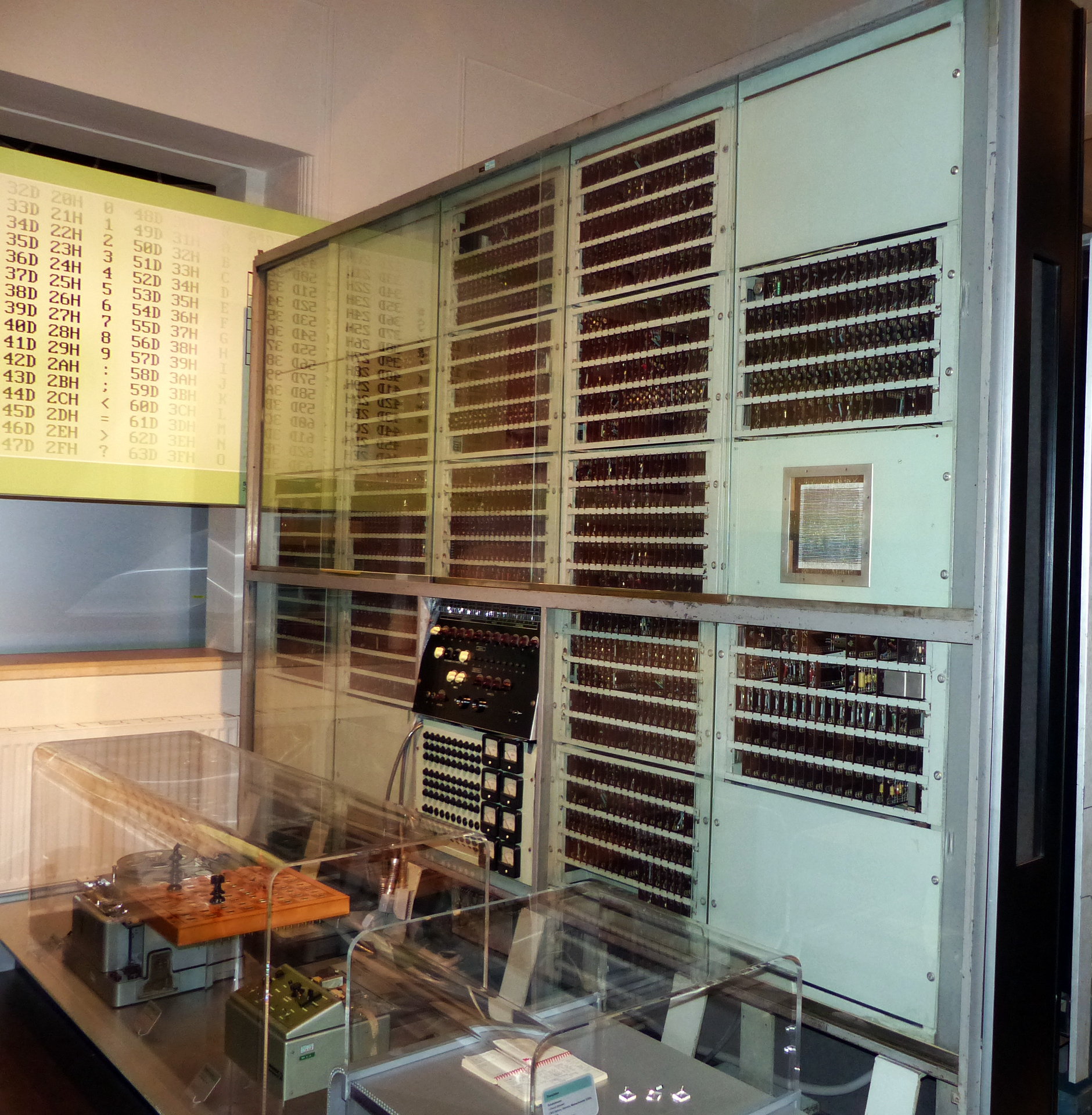 Transistorrechner Mailüfterl, Heinz Zemanek und Mitarbeiter, Wien, 1957/58; Exponat im Technischen Museum Wien